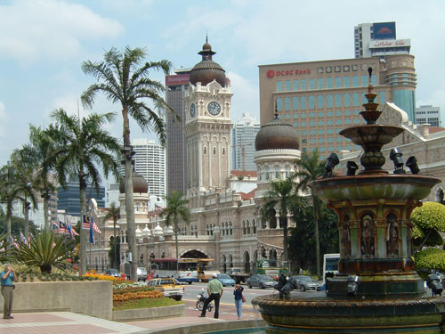 Abdul Samad Bldg in Kuala Lumpur